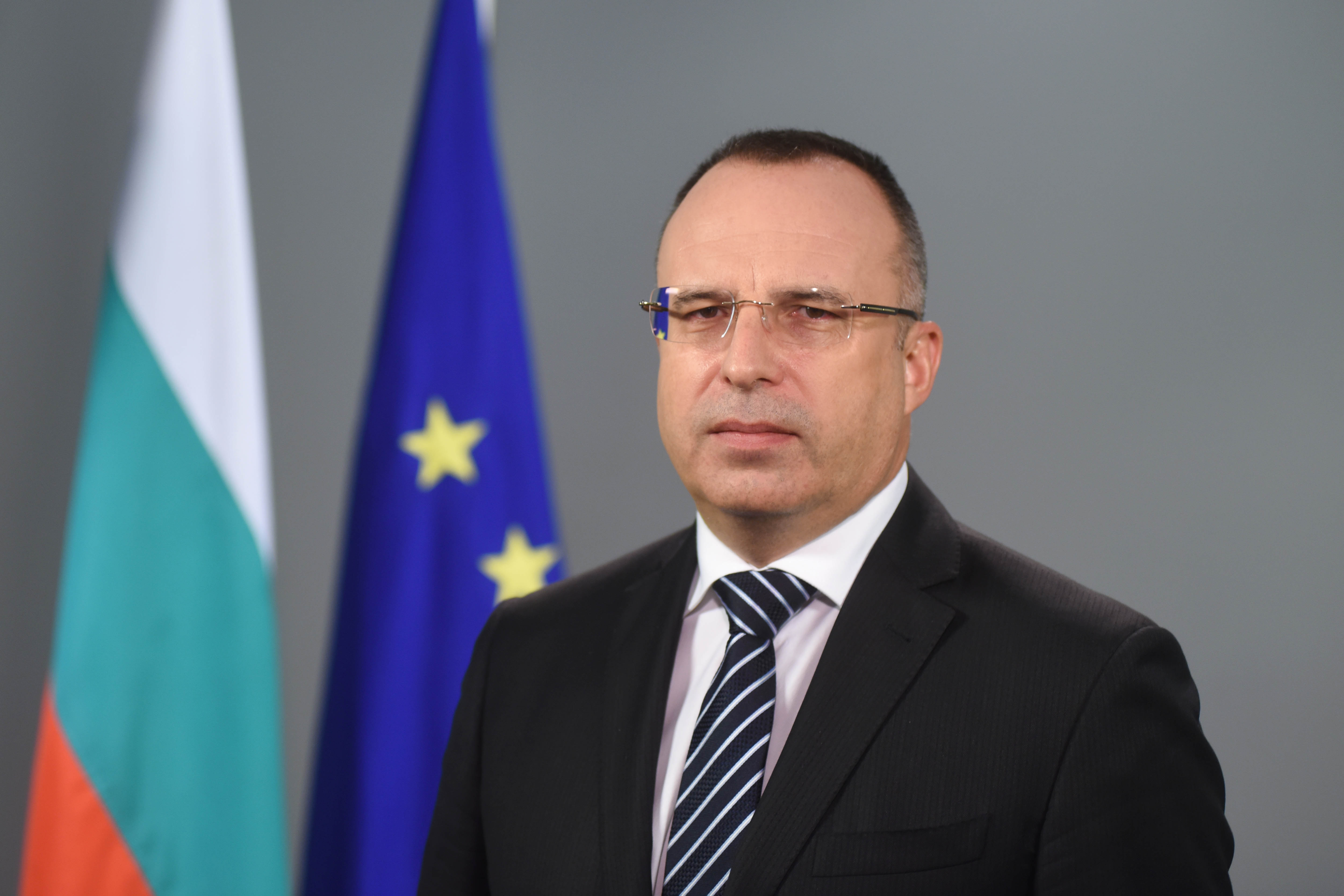 Photo: Velislav Nikolov (EU2018BG)